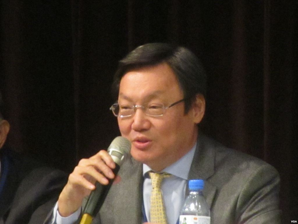 台北论坛基金会董事长苏起(美国之音张佩芝拍摄)